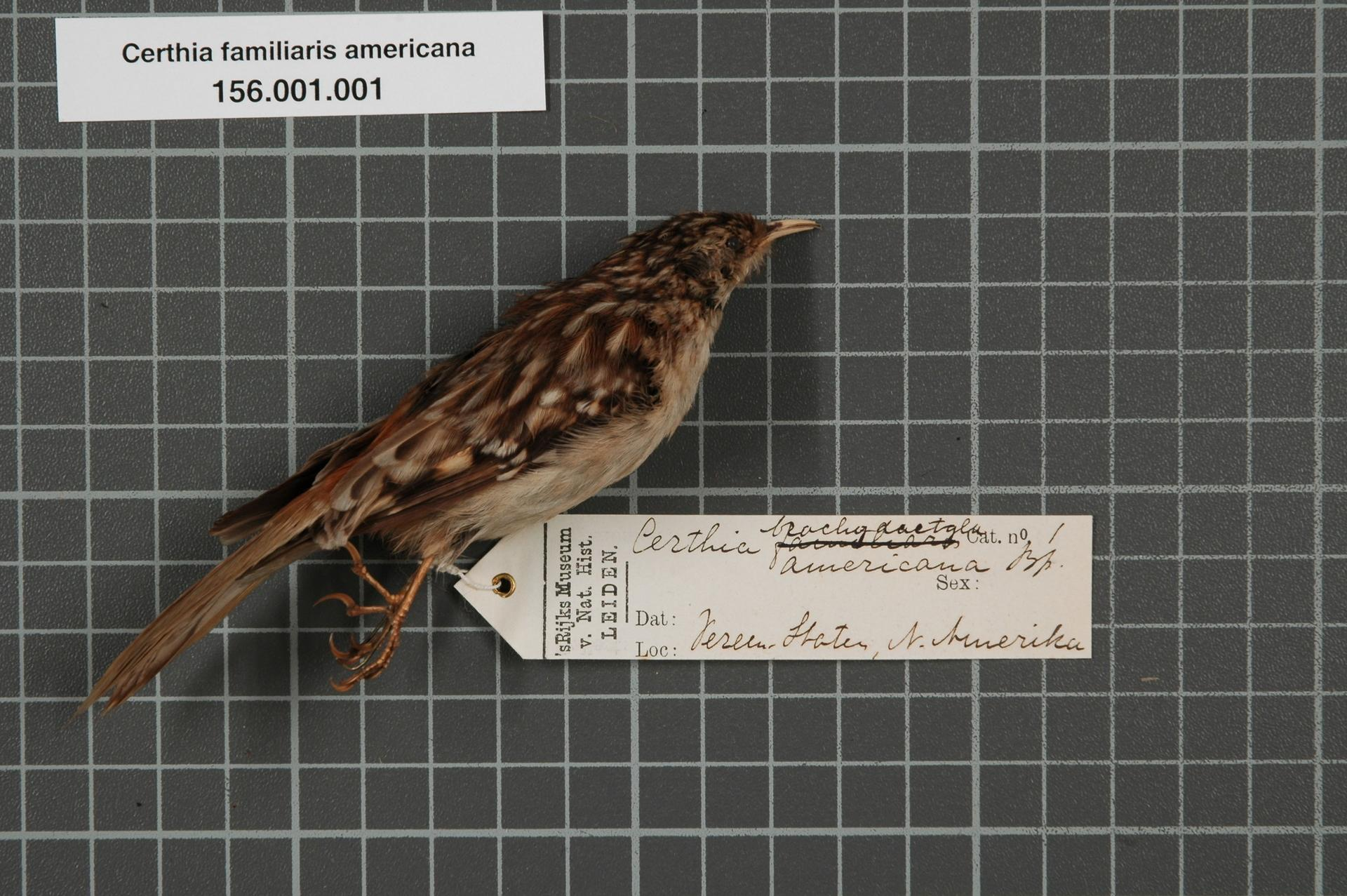 Certhia familiaris americana Bonaparte, 1838